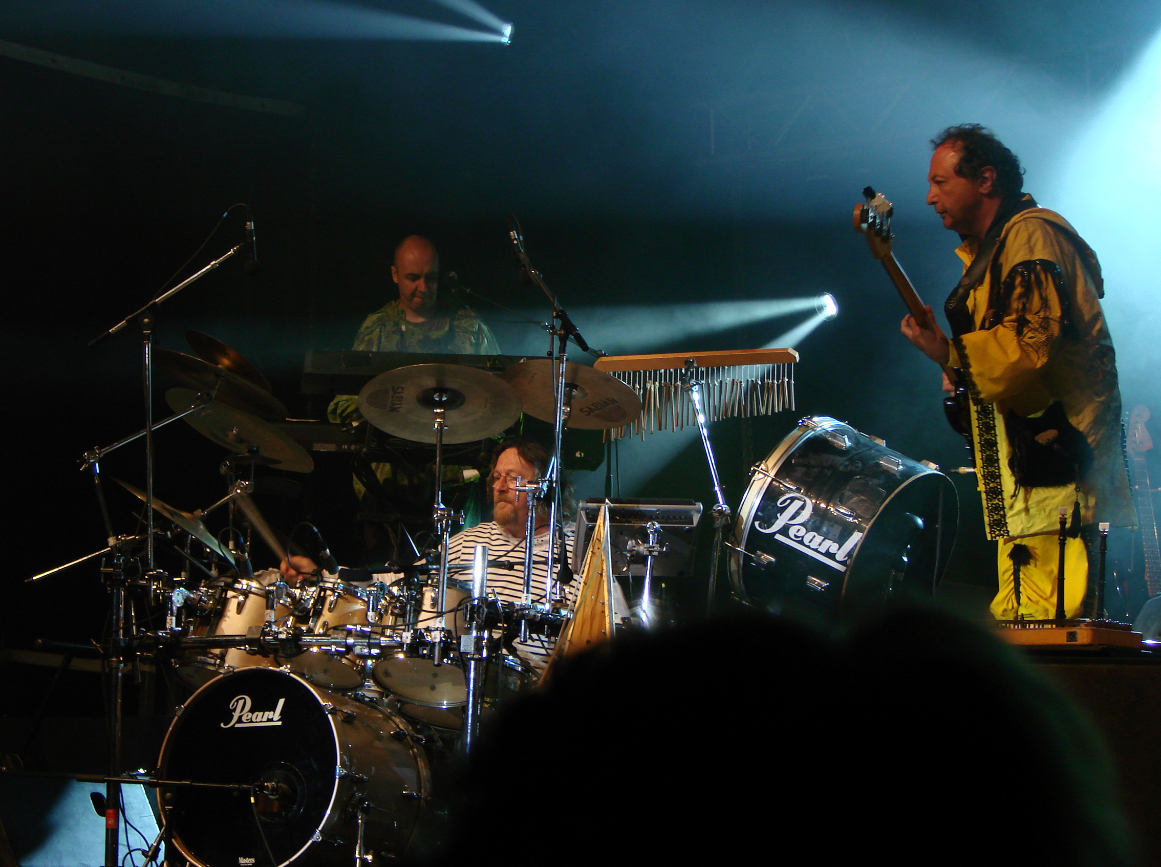 Tri Yann, à l'Aymon Folk Festival, Bogny-sur-Meuse, le 4/08/2007: Jean-Luc Chevalier (à droite) et Gérard Goron à la batterie.